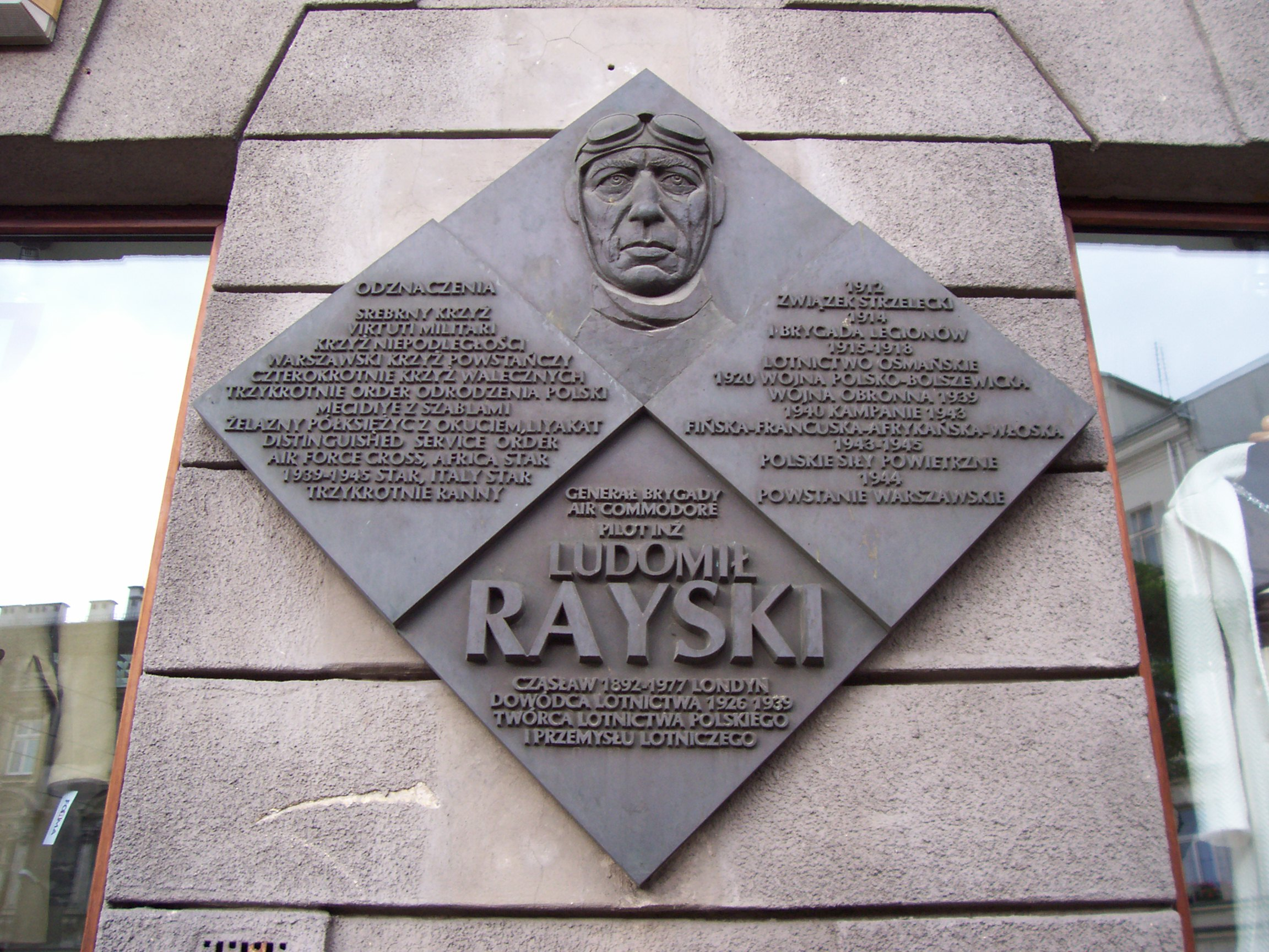 Tablica ku czci gen. Ludomiła Rayskiego na tzw. "Domu Tureckim" u zbiegu ulic Długiej i Pędzichów w Krakowie